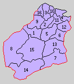 島根県能義郡の町村制時点の町村。